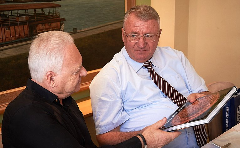 Член Комитета Совета Федерации по международным делам, представитель в СФ от законодательного (представительного) органа государственной власти Ярославской области Анатолий Лисицын и лидер Сербской радикальной партии (СРП) Воислав Шешель